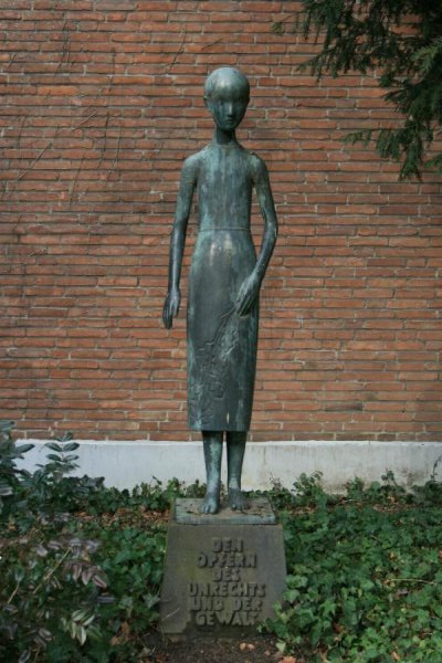 Denkmal Nr. 242 in Viersen